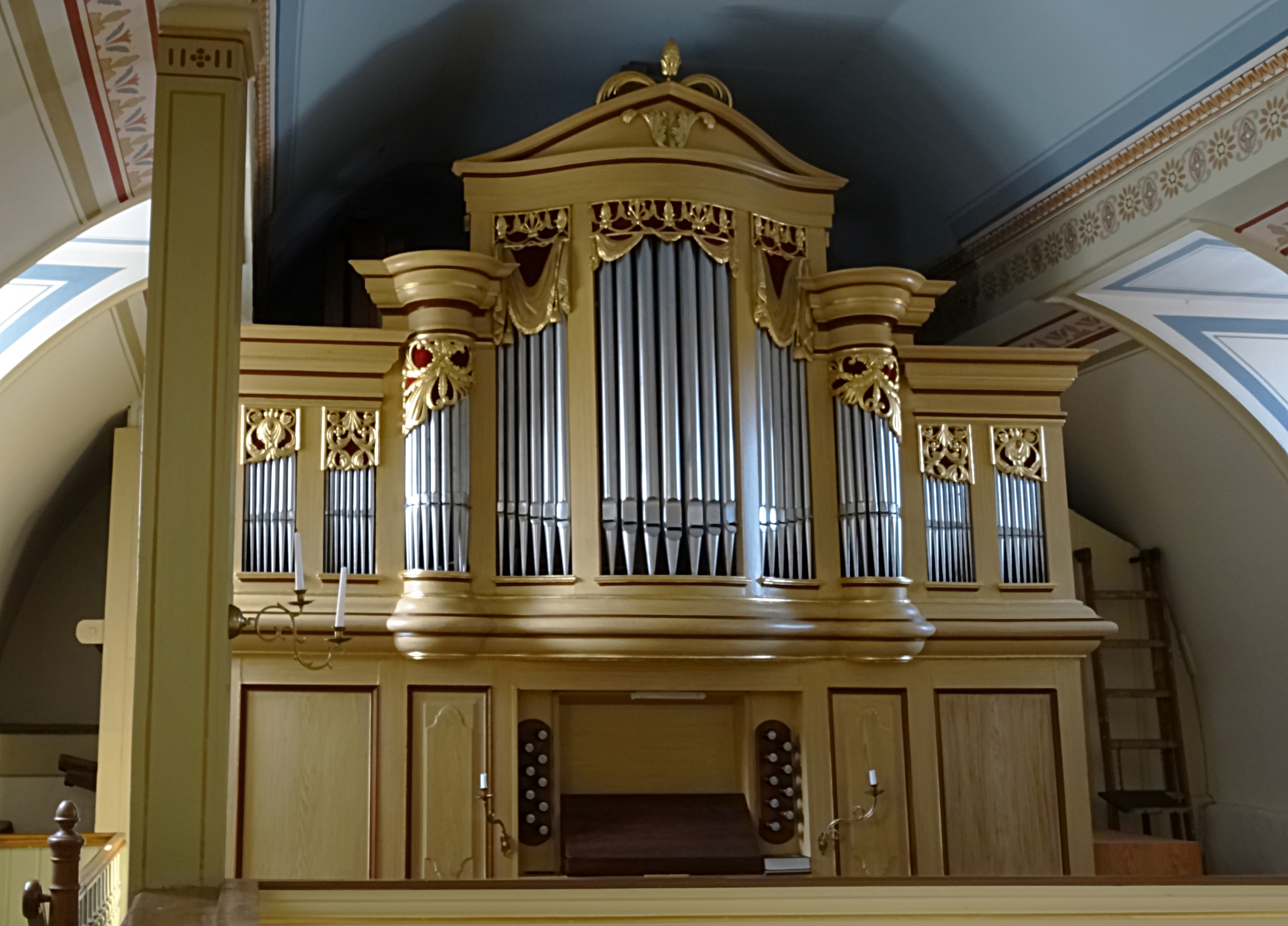 Holland-Orgel von 1758 in der Kirche zu Wümbach